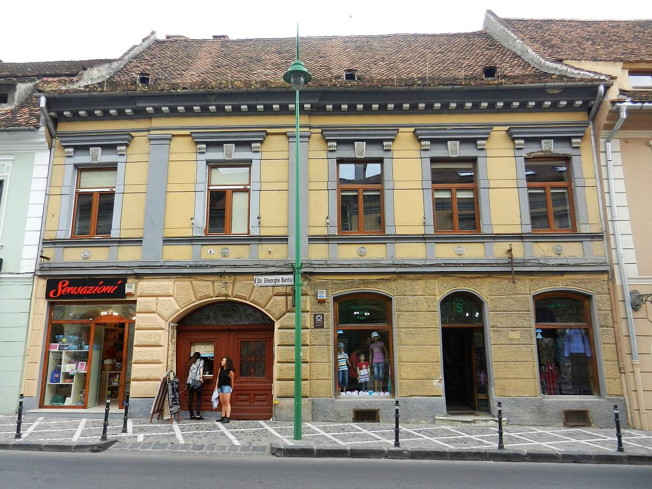 Casa monument istoric (Baritiu 4)